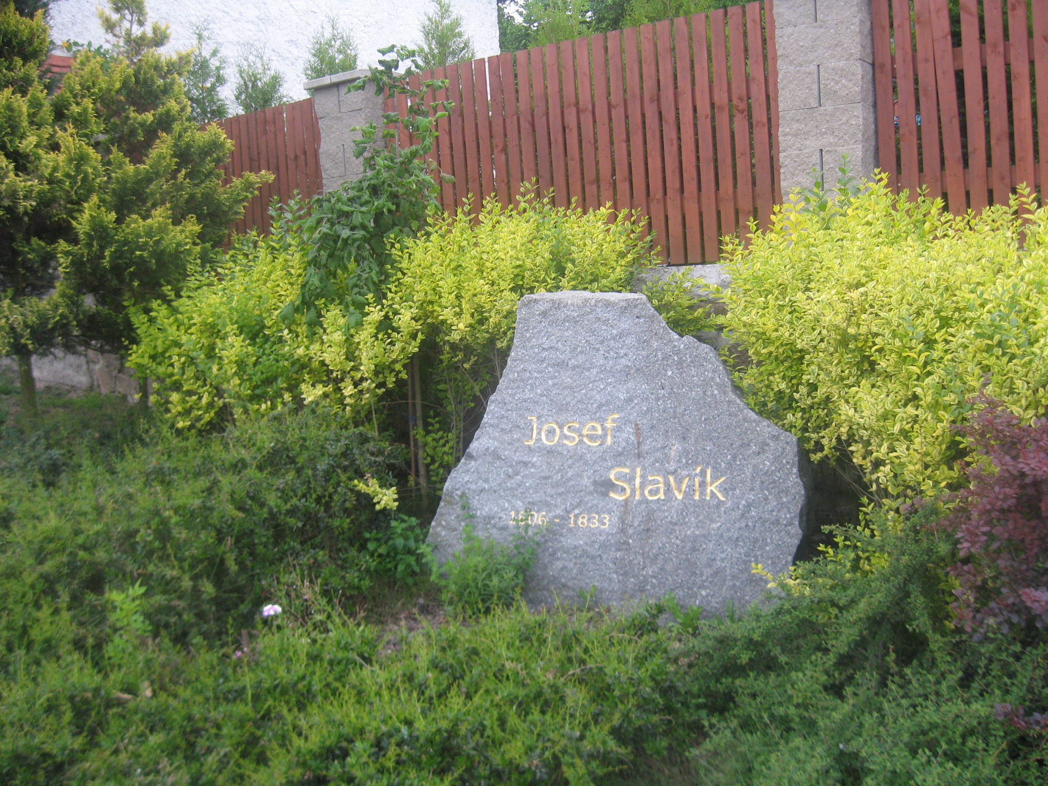 Jince, památník houslisty Josefa Slavíka